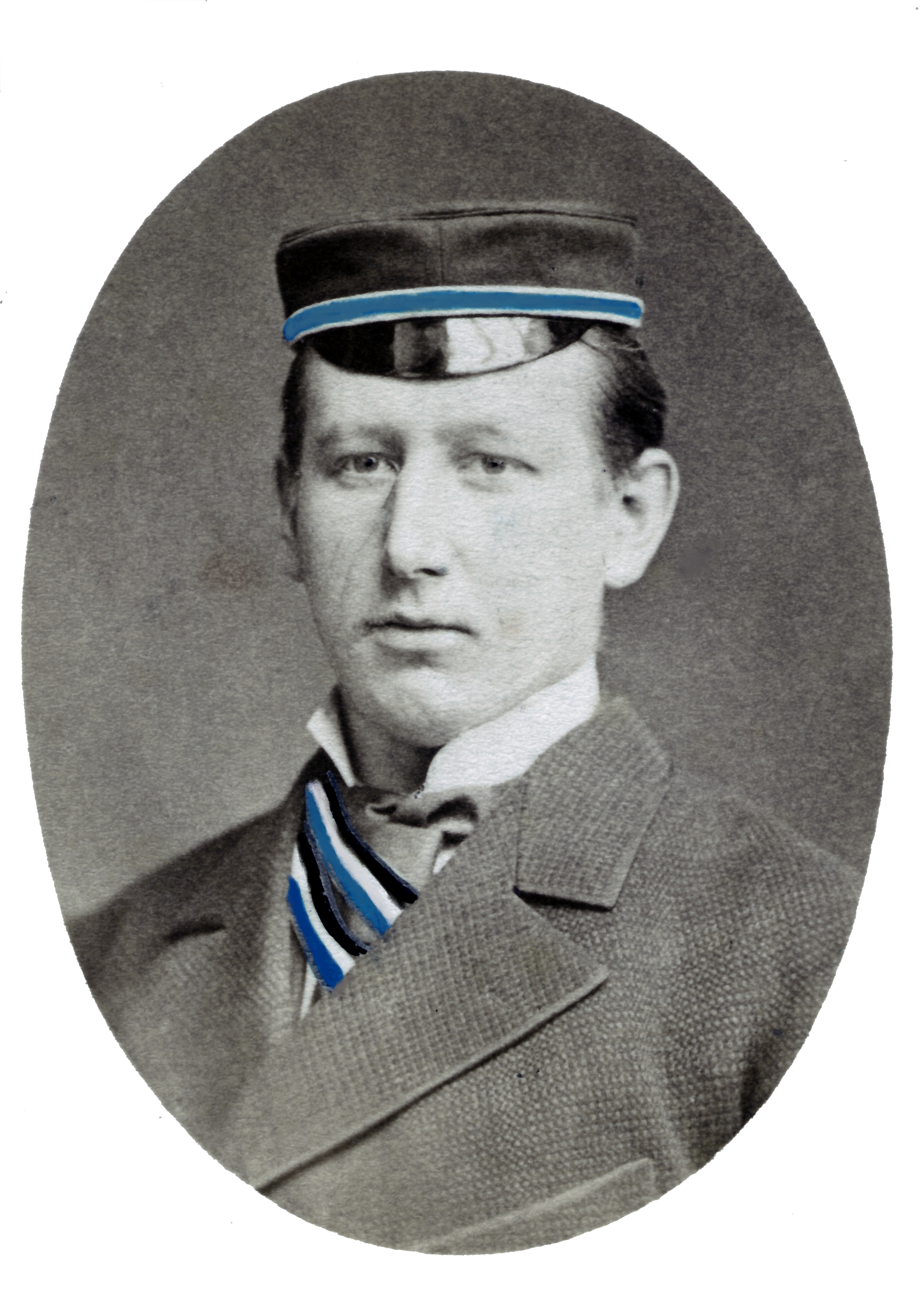 Porträtfotografie des späteren Dermatologen und Venerologen Wilhelm Harttung (1857–1923)